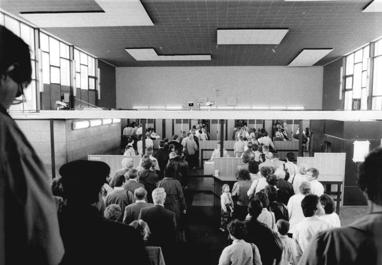 ADN-Franke-3.4.90-Berlin- An der Grenzübergangsstelle nach Westberlin Bahnhof Friedrichstraße herrscht stets lebhafter Verkehr, der sich an den Osterfeiertagen noch erheblich steigern wird. Viele Reisende, die nicht motorisiert sind, bevorzugen diesen Weg nach Westberlin. Die Kontrollorgane der DDR sind um eine schnelle Abfertigung bemüht.